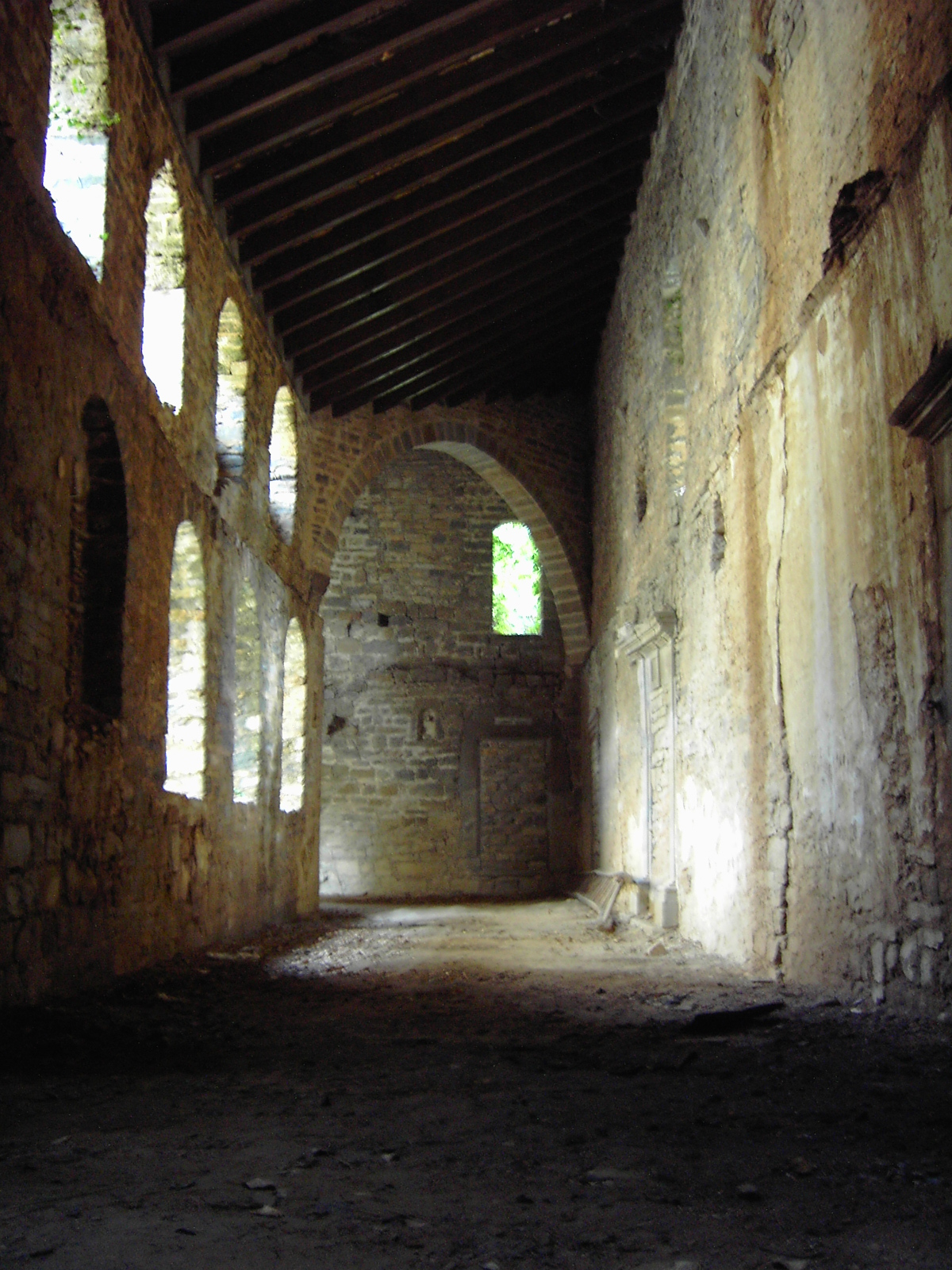 La deambulatorio o deambulatorio de San Victorián.